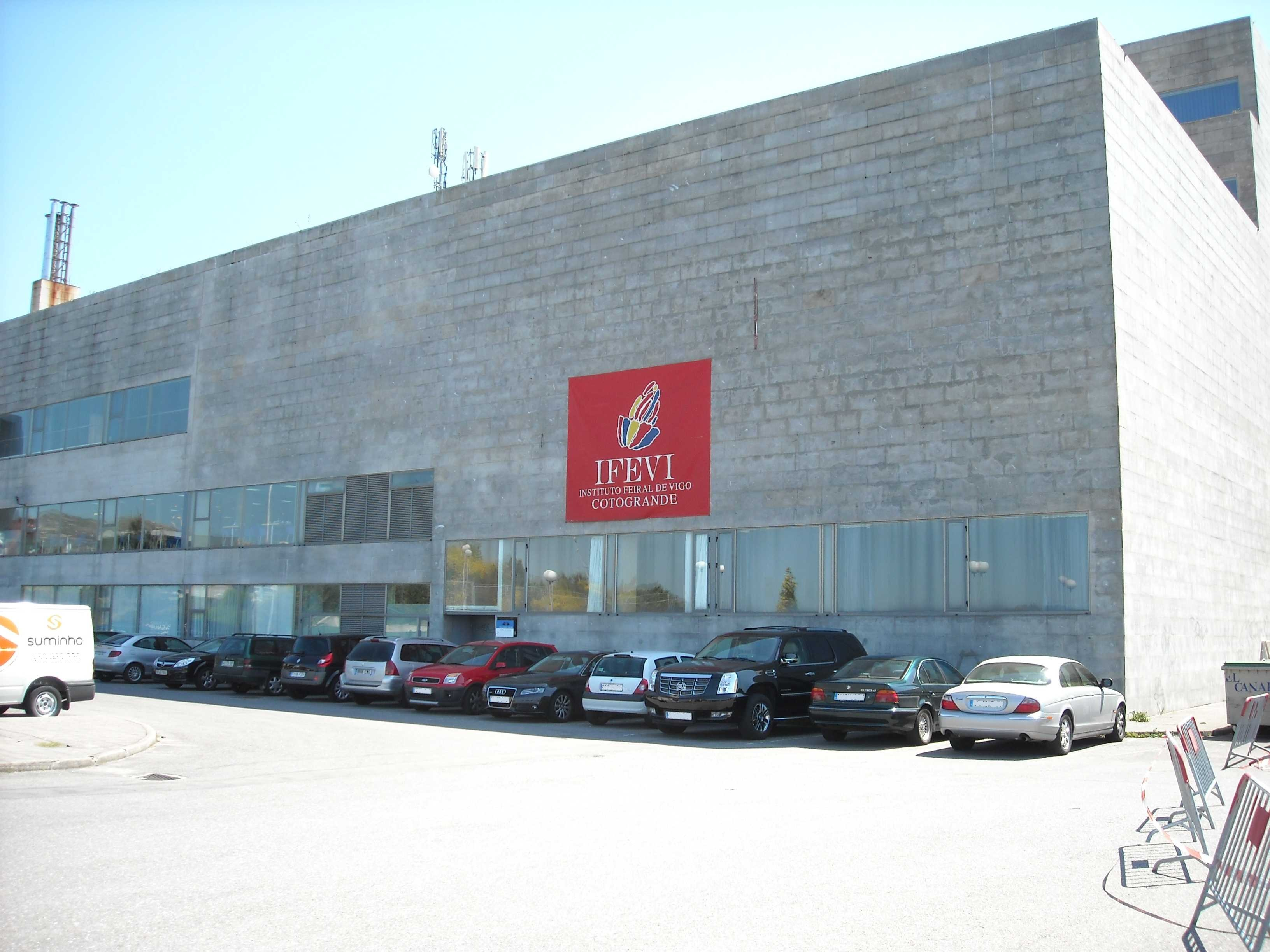 IFEVI, Instituto Feiral de Vigo, Cotogrande, maio do 2009.